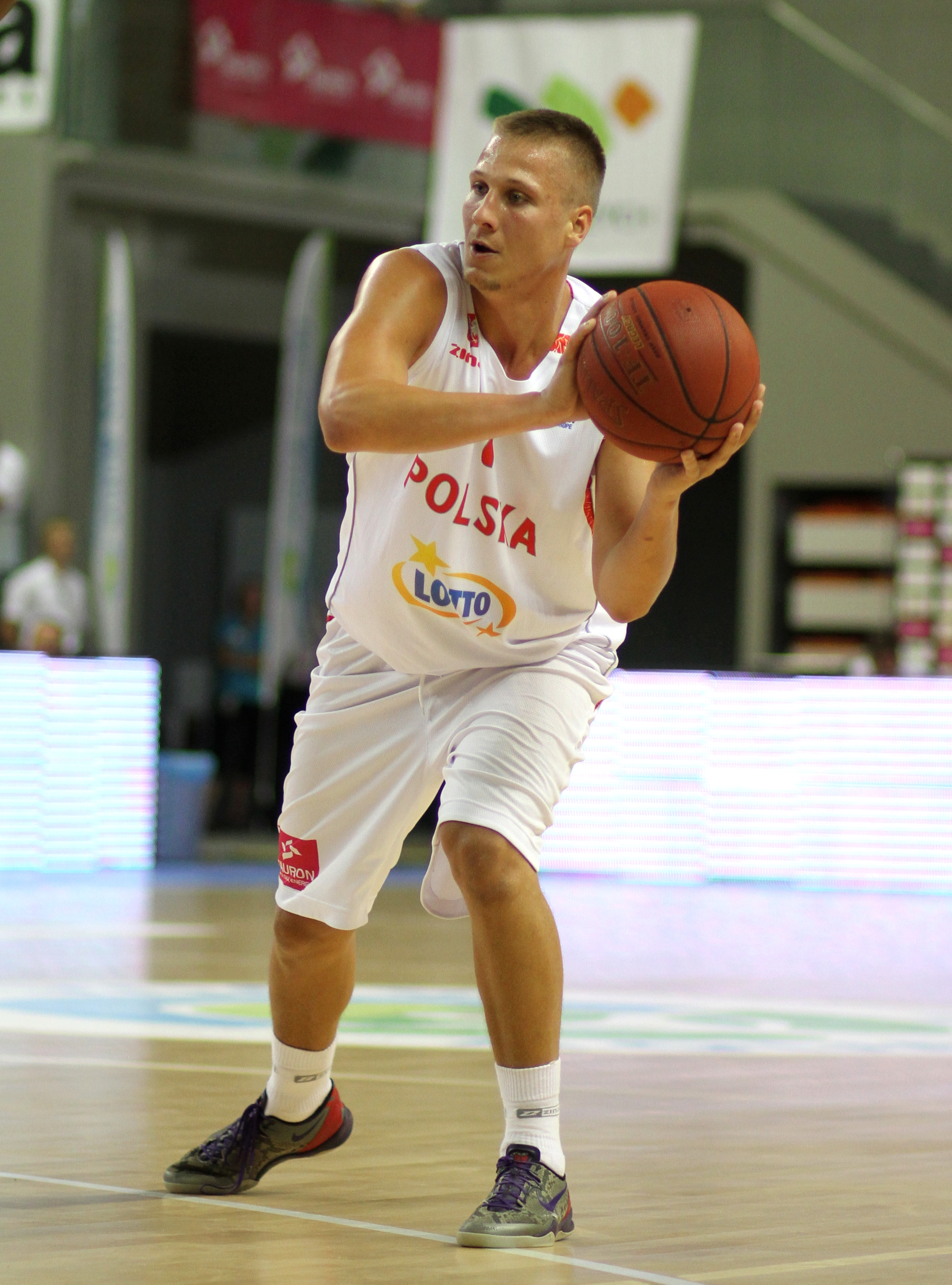 Mecz sparingowy reprezentacji Polski i Czech w koszykówce, Wałbrzych 18 lipca 2014